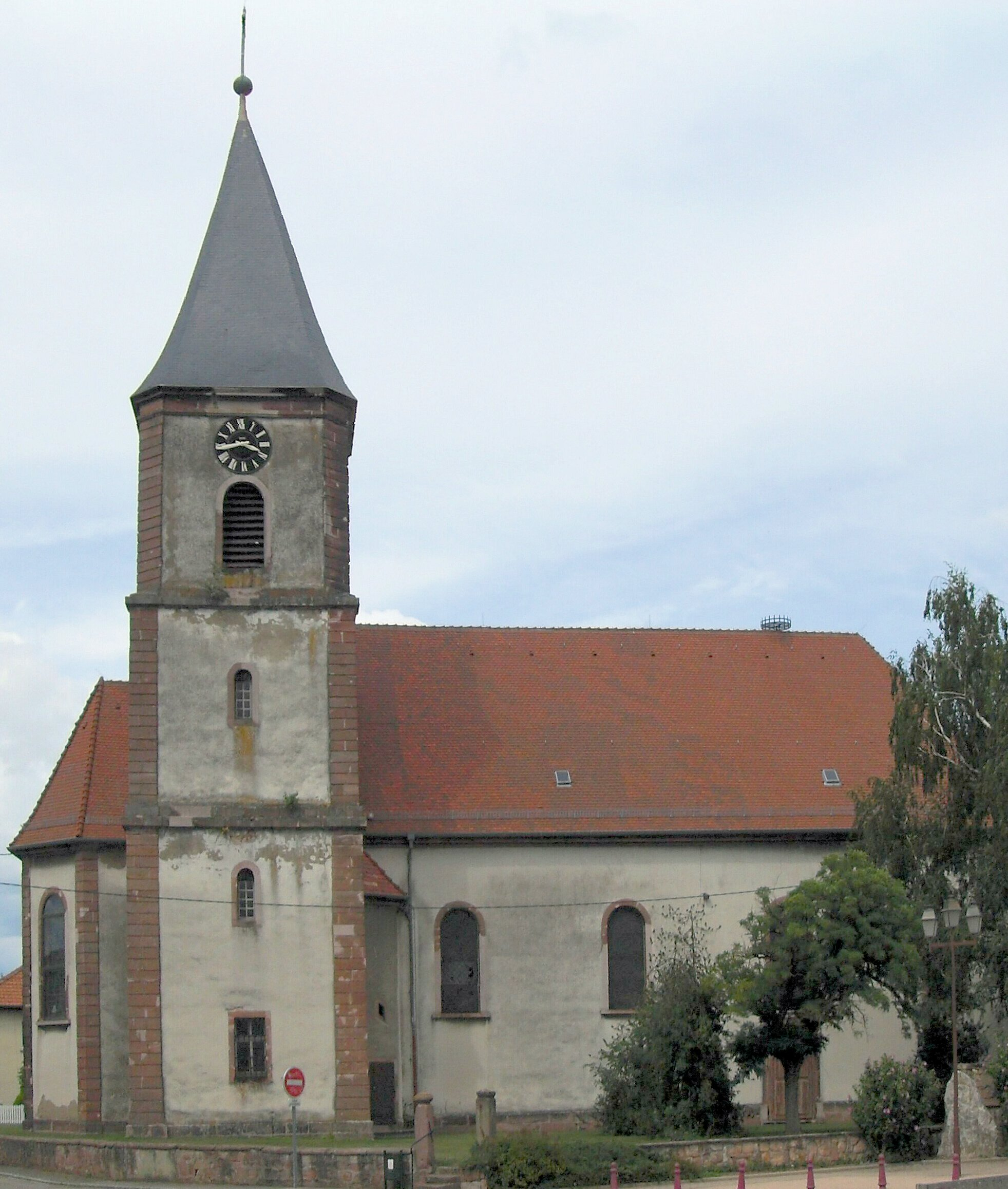 L'église Saint-Nicolas à Ruelisheim